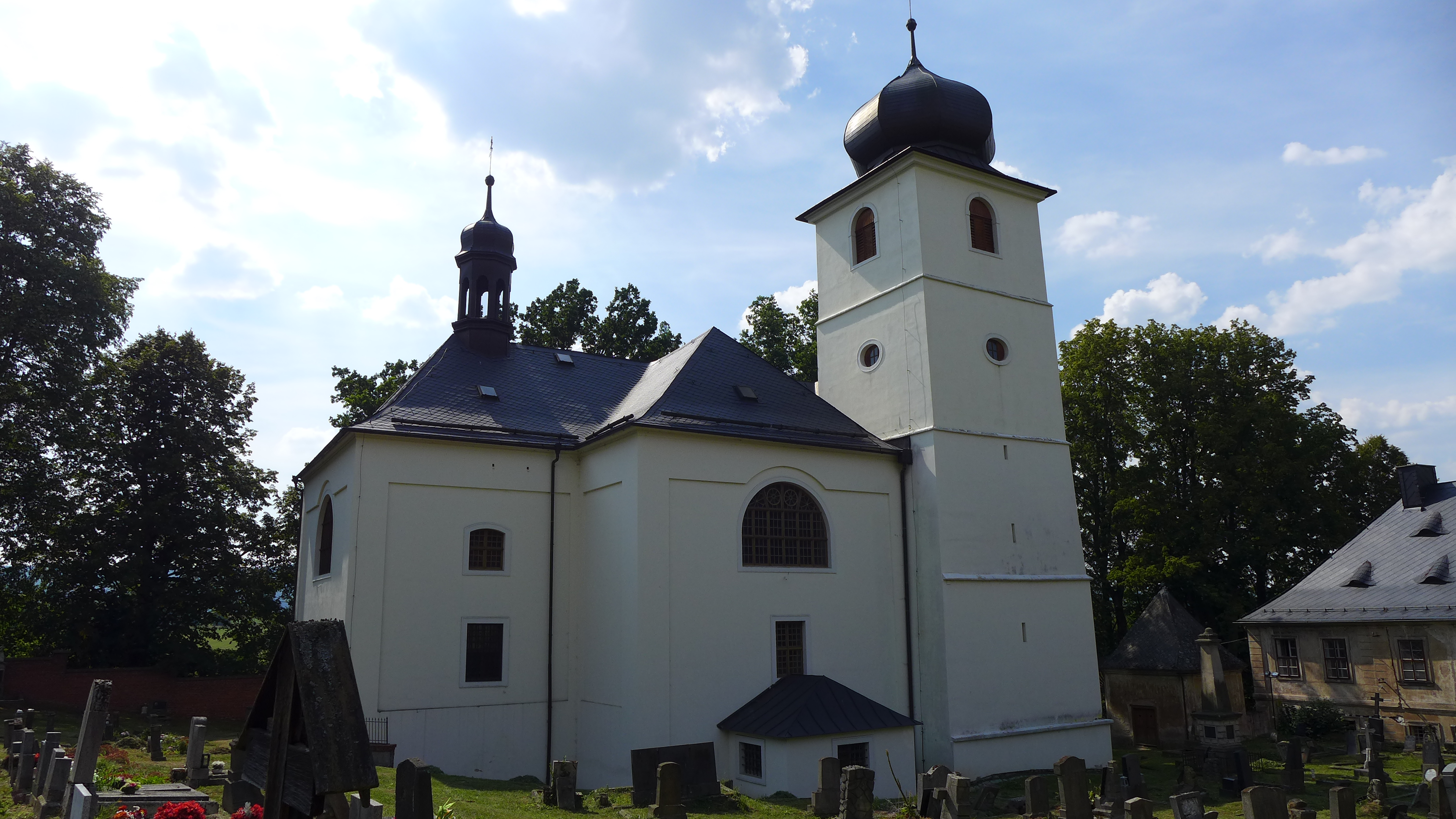 Kostel Panny Marie, svatého Jiří a svatého Martina s farou, severní okraj obce, na západním svahu návrší Chmelnice, Martínkovice.